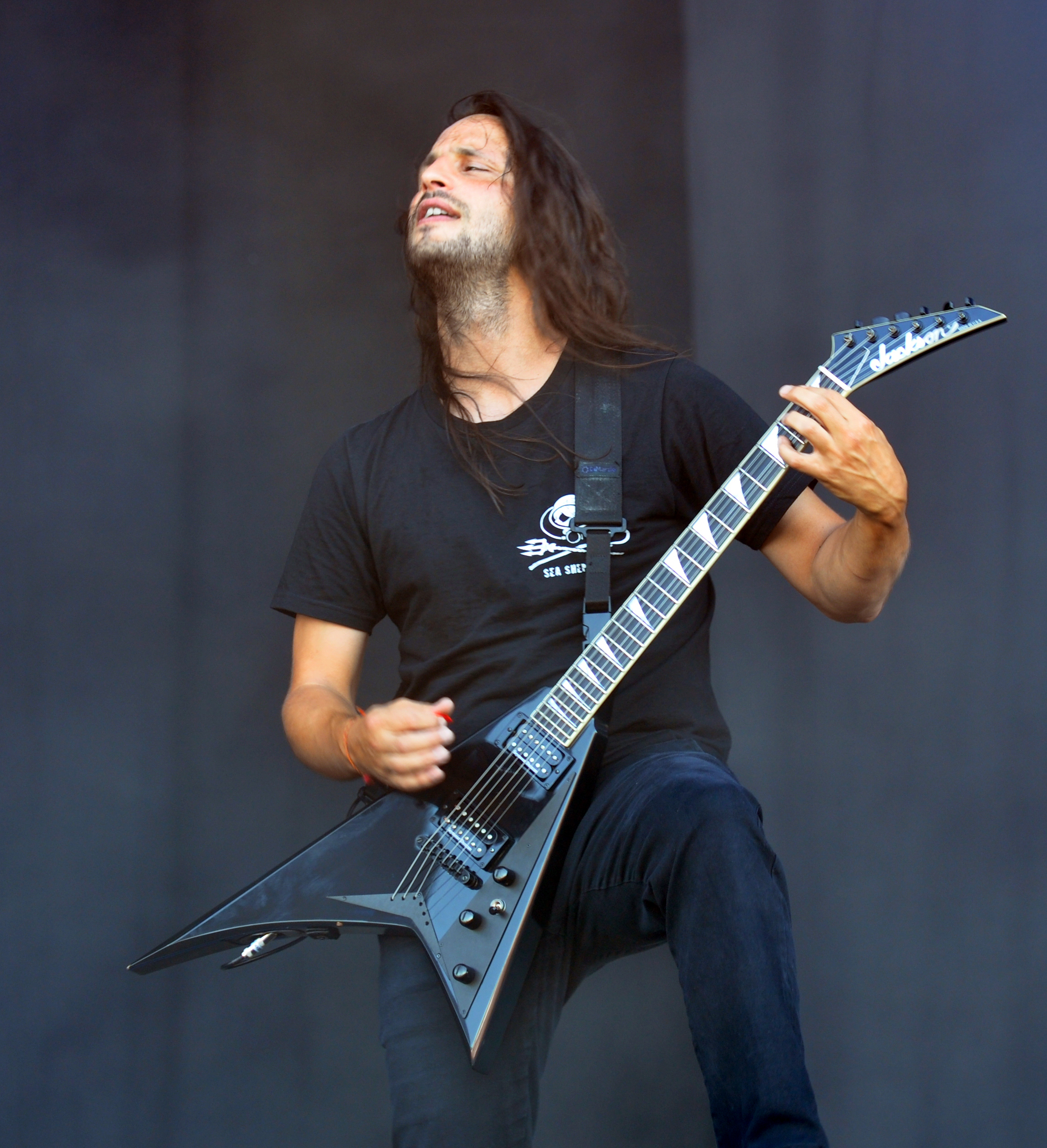 Gojira at Wacken Open Air 2013